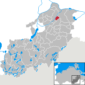 Genzkow in Mecklenburg-Vorpommern, Landkreis Mecklenburg-Strelitz